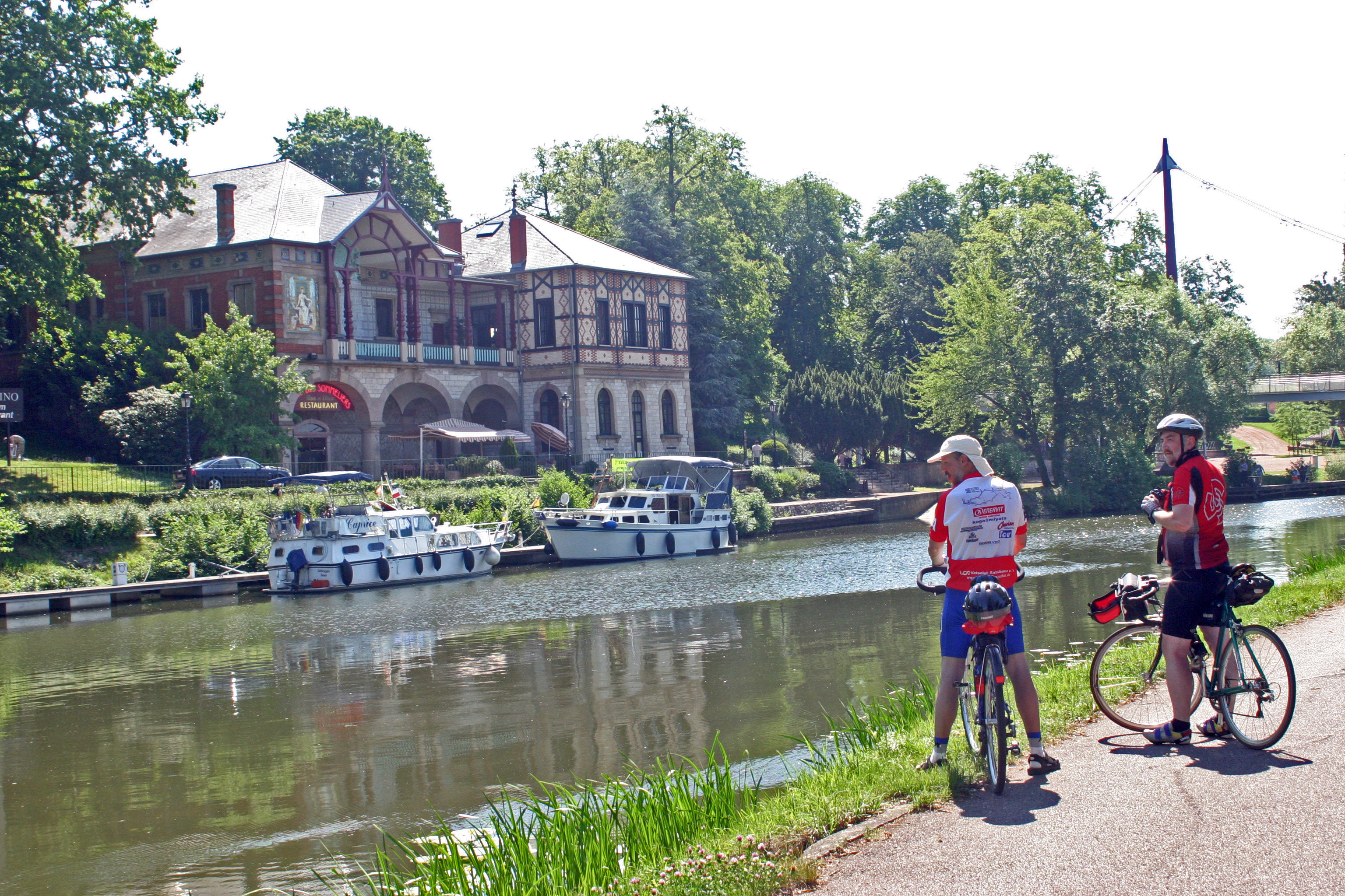 Sarreguemines, Casino de la Faïencerie